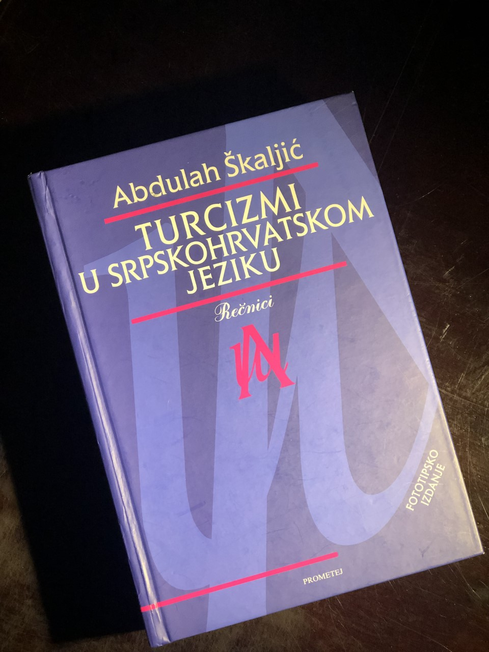 Слика речника Турцизми у српскохрватском језику Абдулаха Шкаљића, издање Прометеја, 2015. година